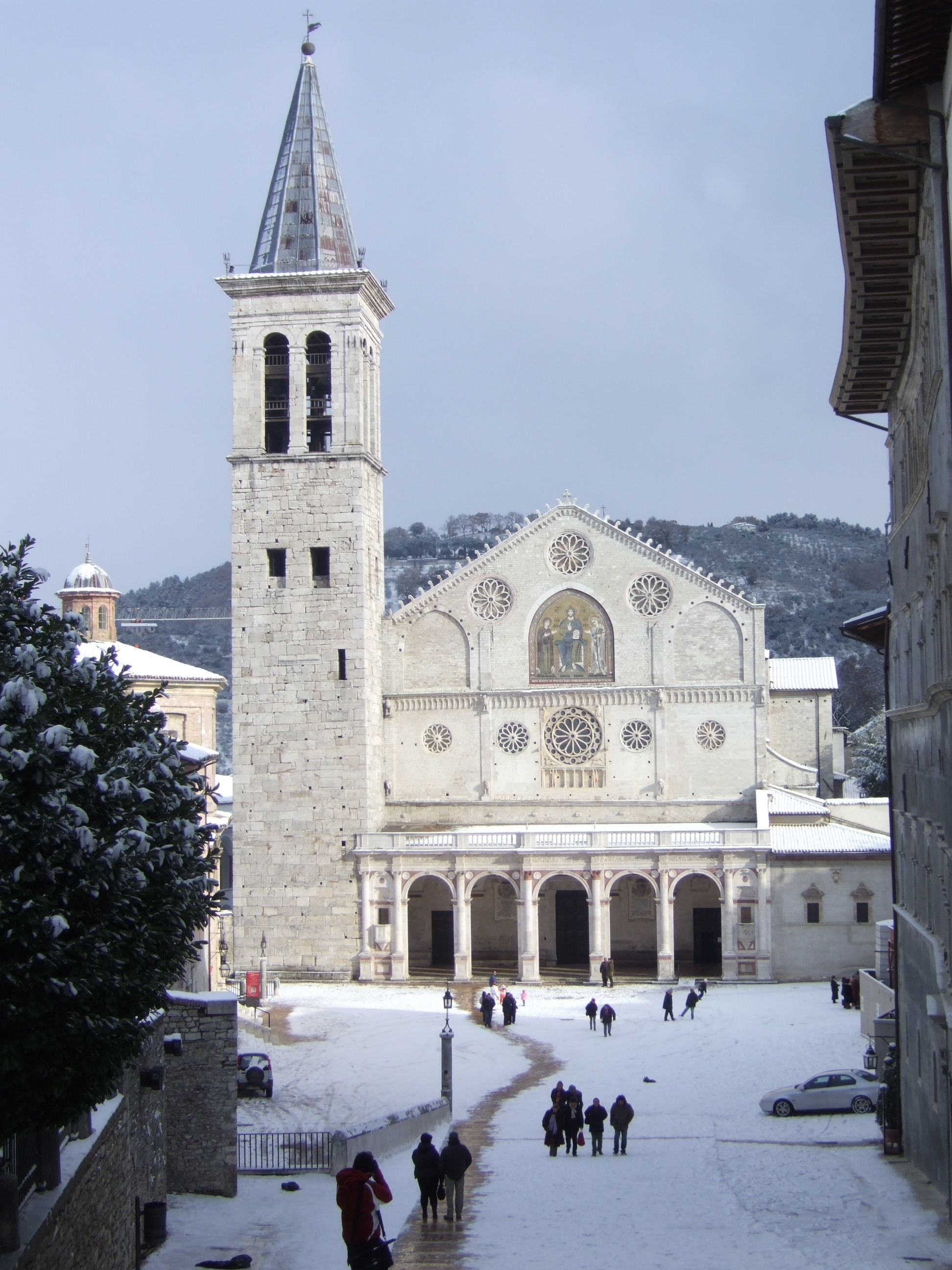 Veduta invernale del duomo di Spoleto